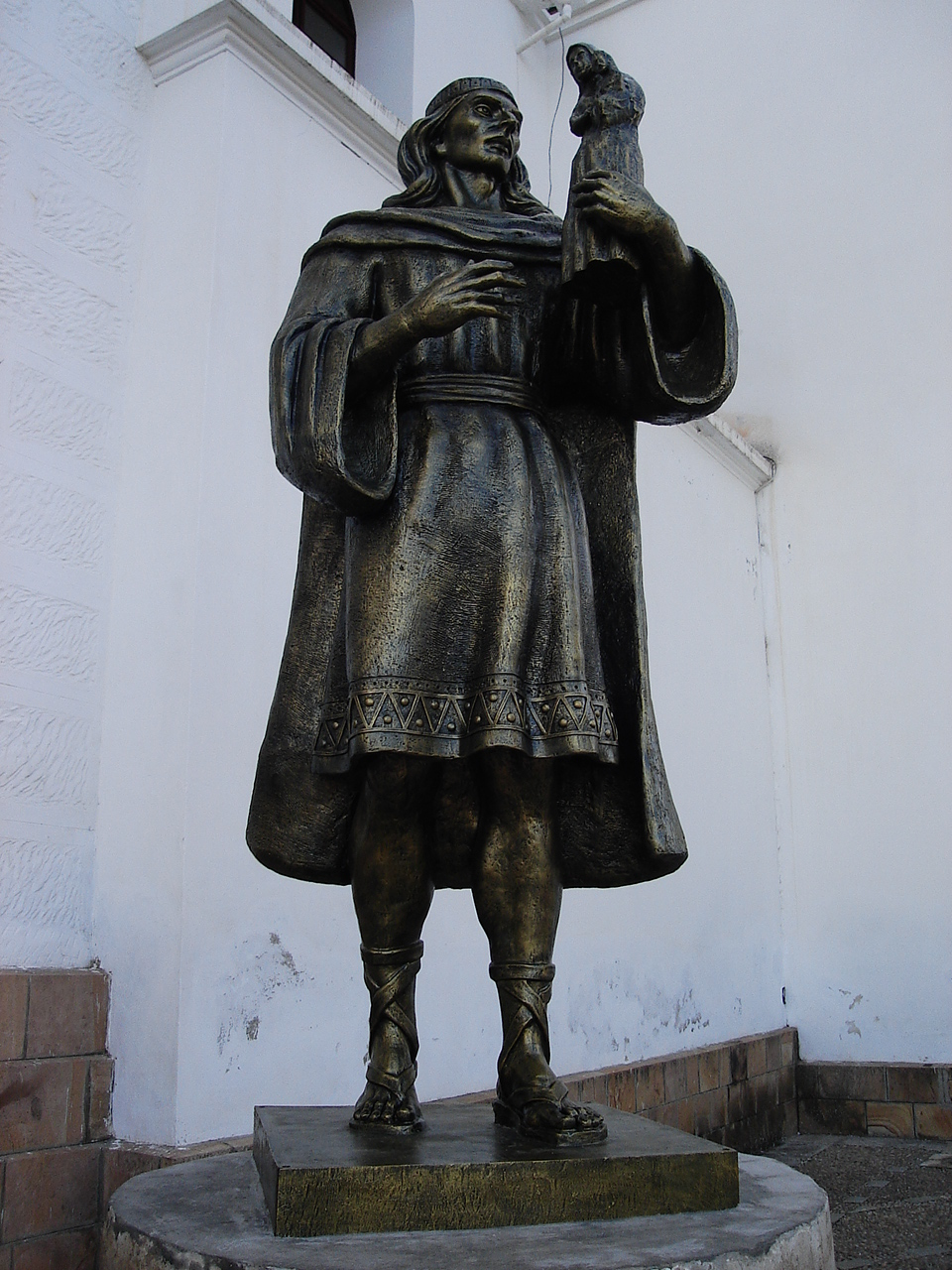 Estátua na Igreja Nossa Senhora de Copacabana. Foto tirada por mim, em Copacabana.